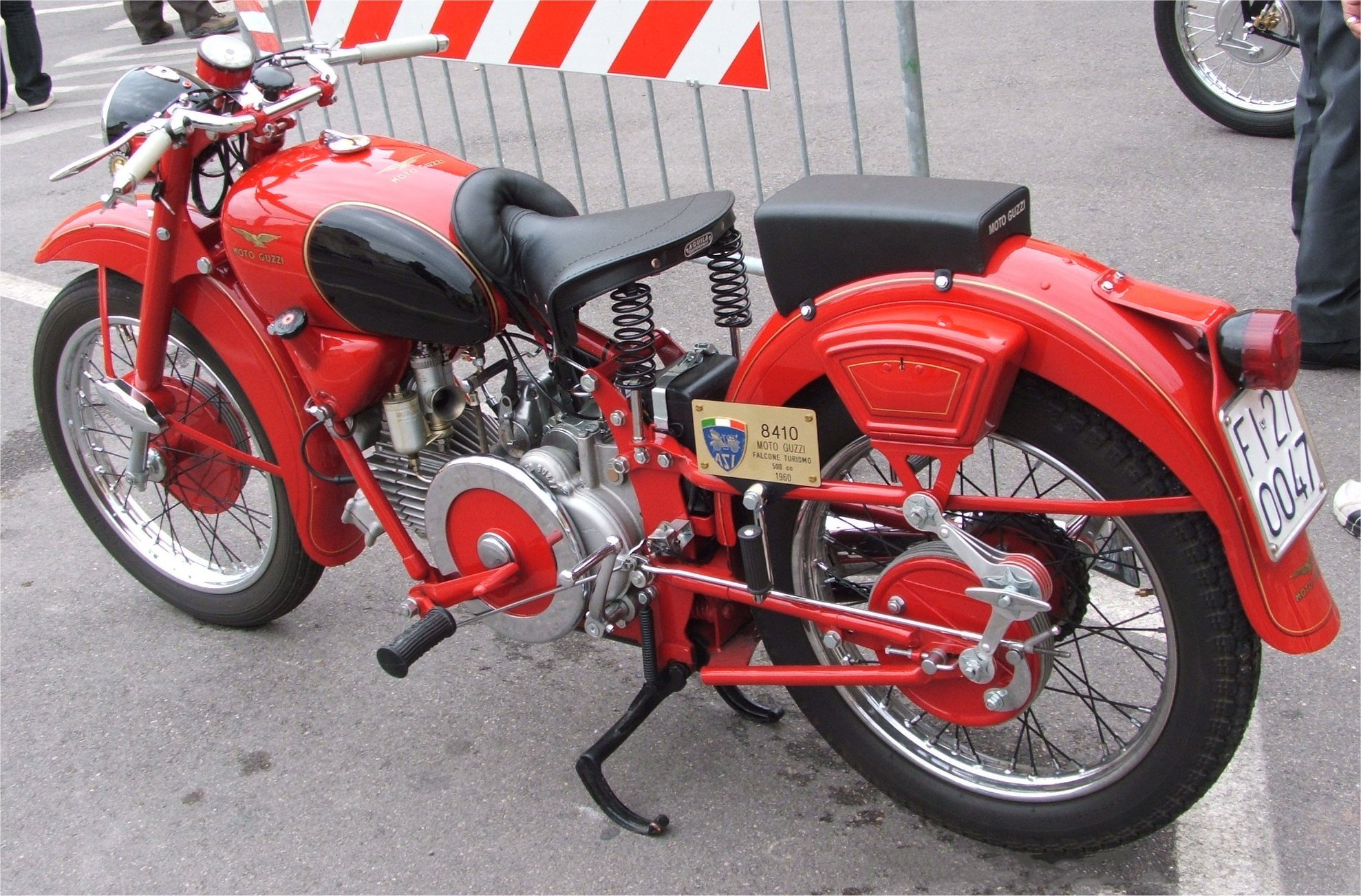 Moto Guzzi 500 Falcone Turismo del 1960 fotografato al Raduno Moto Storiche di Medole nel 2007